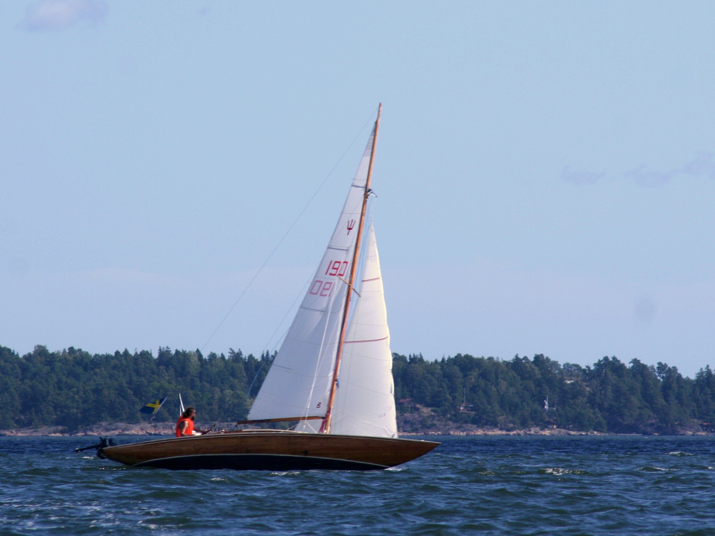 En neptunkryssare på Västra Saxarfjärden. Källa: eget foto, fotograf EnDumEn 23 augusti 2009